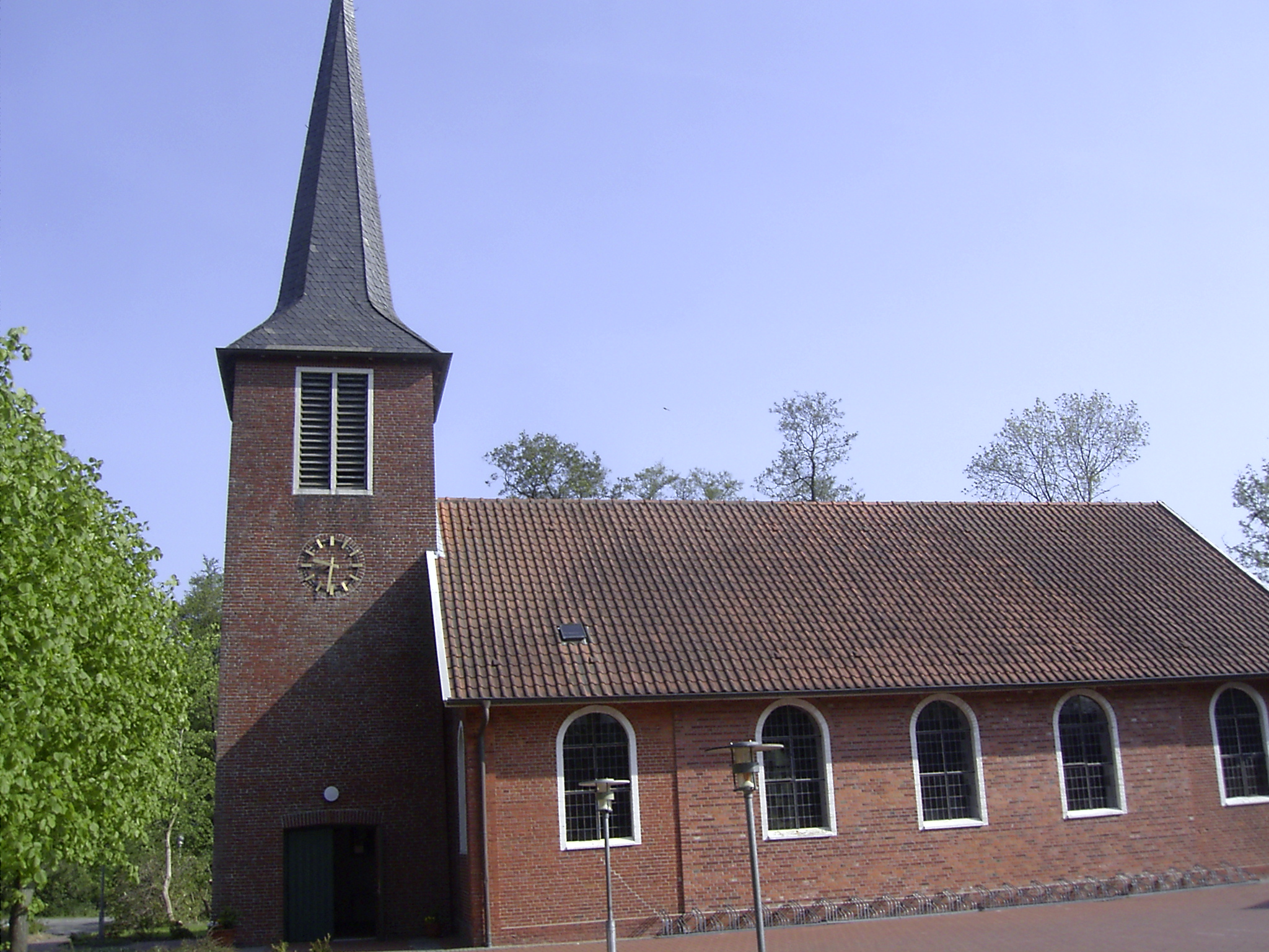 Südseite der Kirche in Berumerfehn, Ostfriesland, Niedersachsen, Deutschland